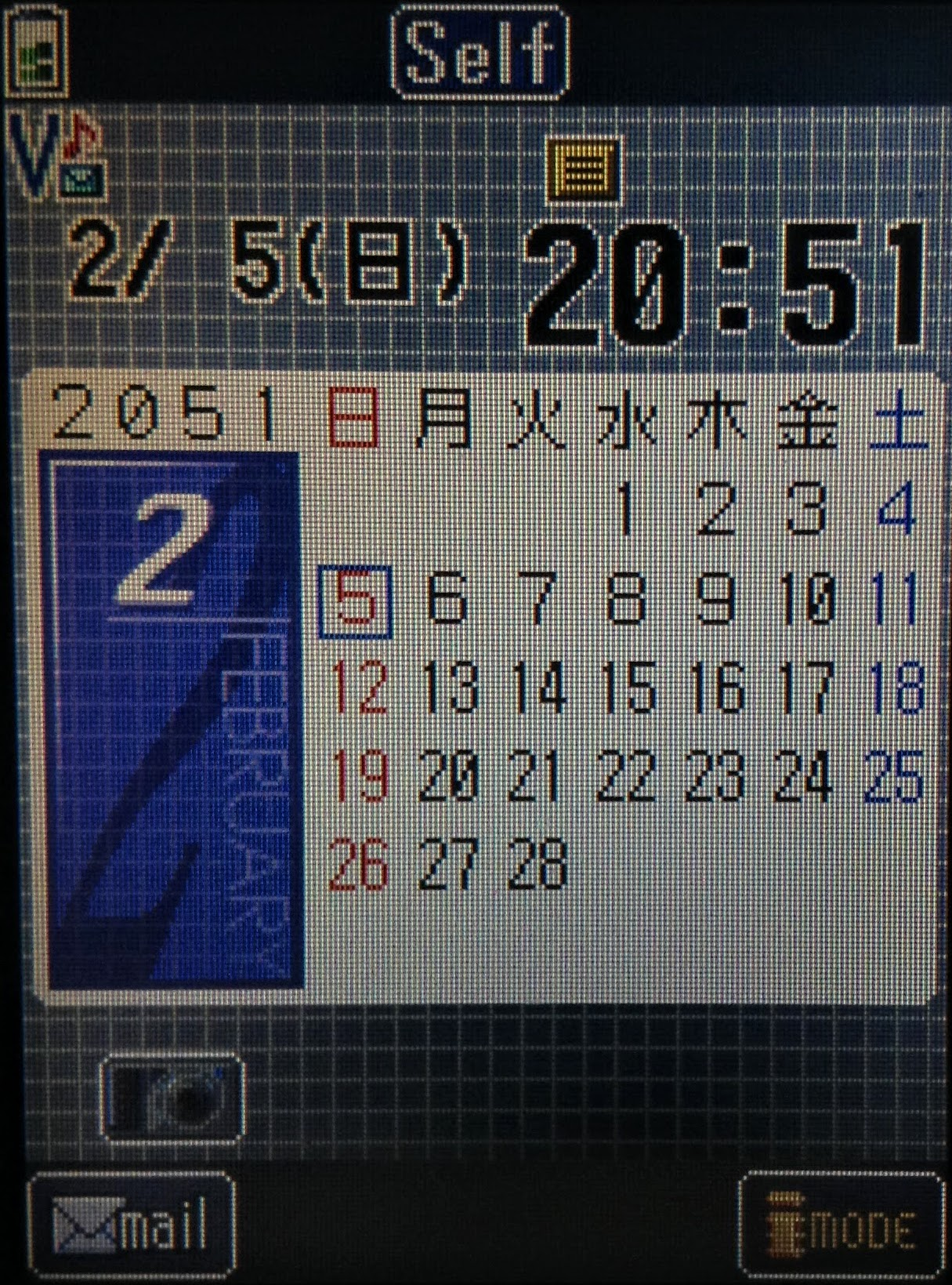 N2051に搭載されたTFD液晶のディスプレイ・待ち受け画面に設定されているのはカレンダー(背景の網模様とグレーの壁紙はP2102Vと同じもの)